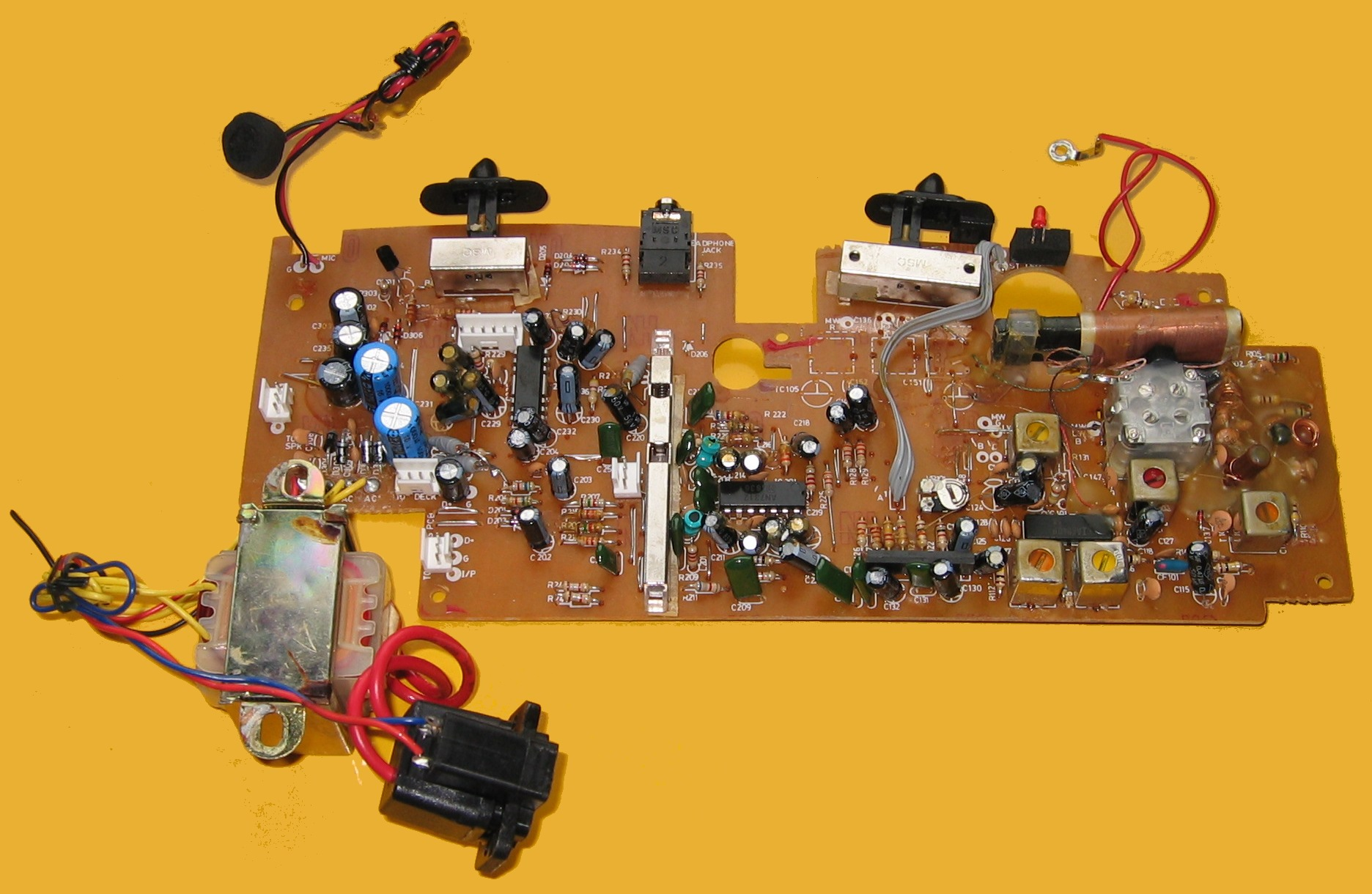 Radiorekorder Leiterplatte